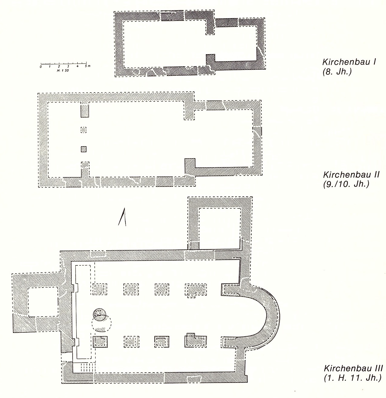 Kirchberg, Plan des églises I à III